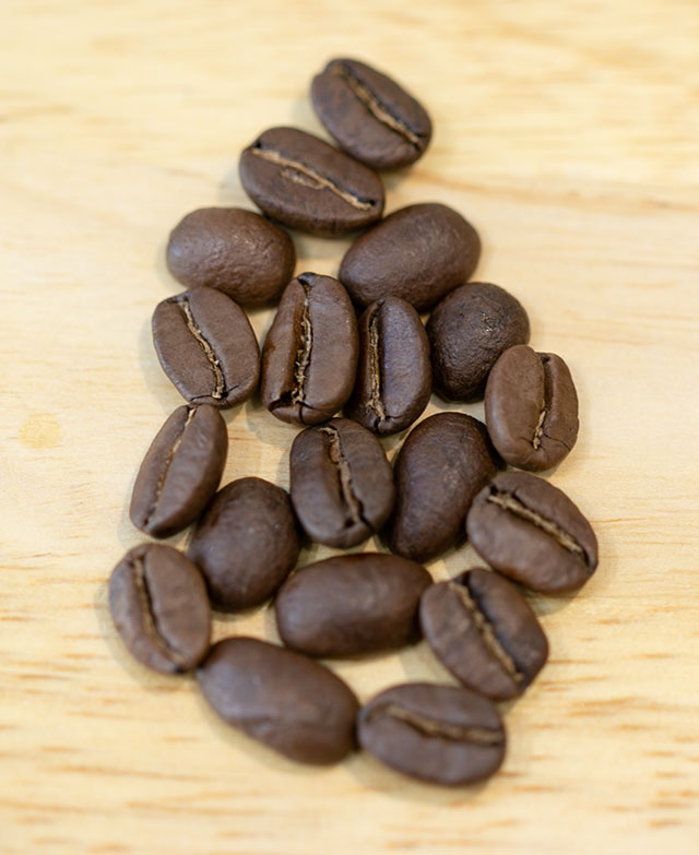 Hạt Arabica đặc trưng dài, thon